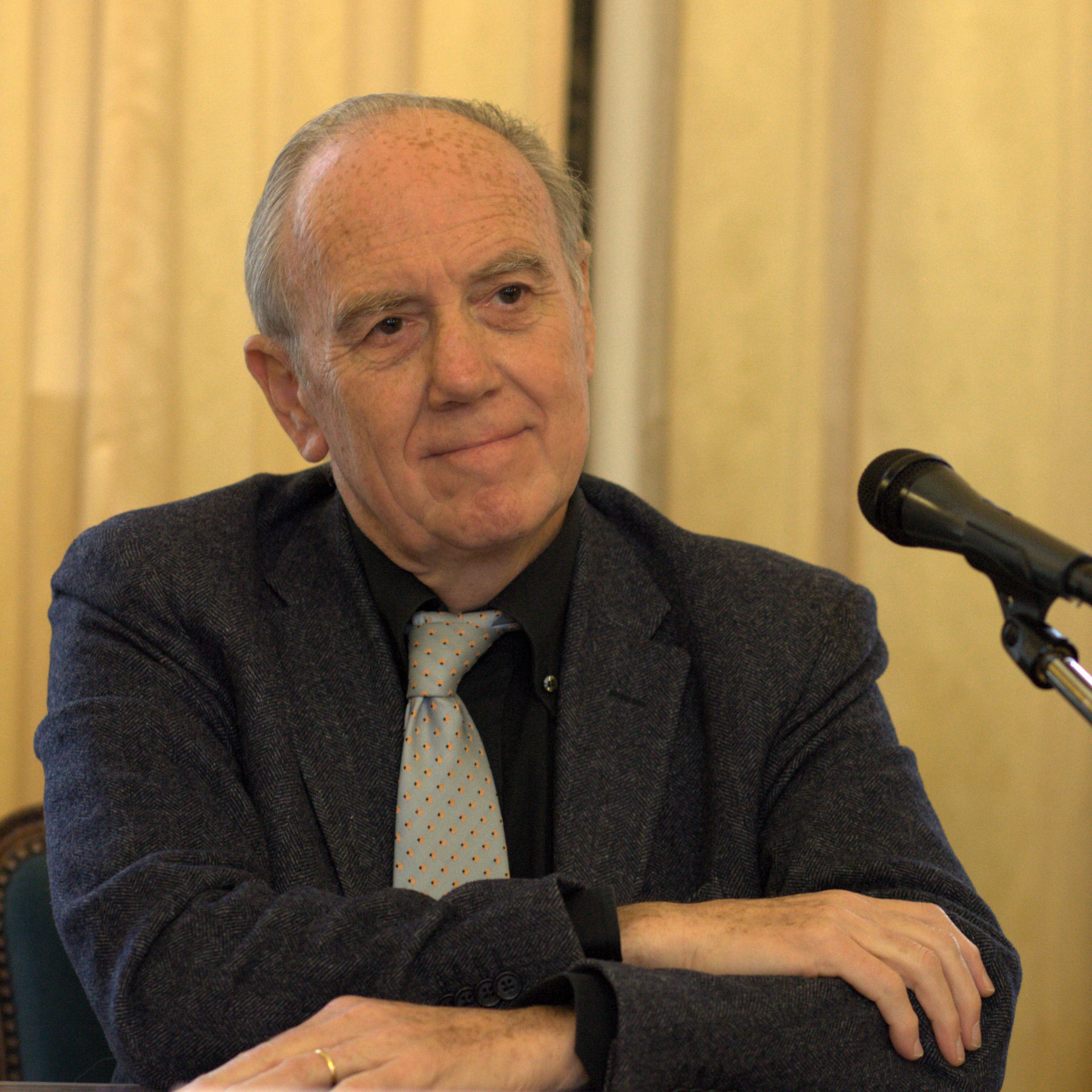 Professor Henri Joyeux